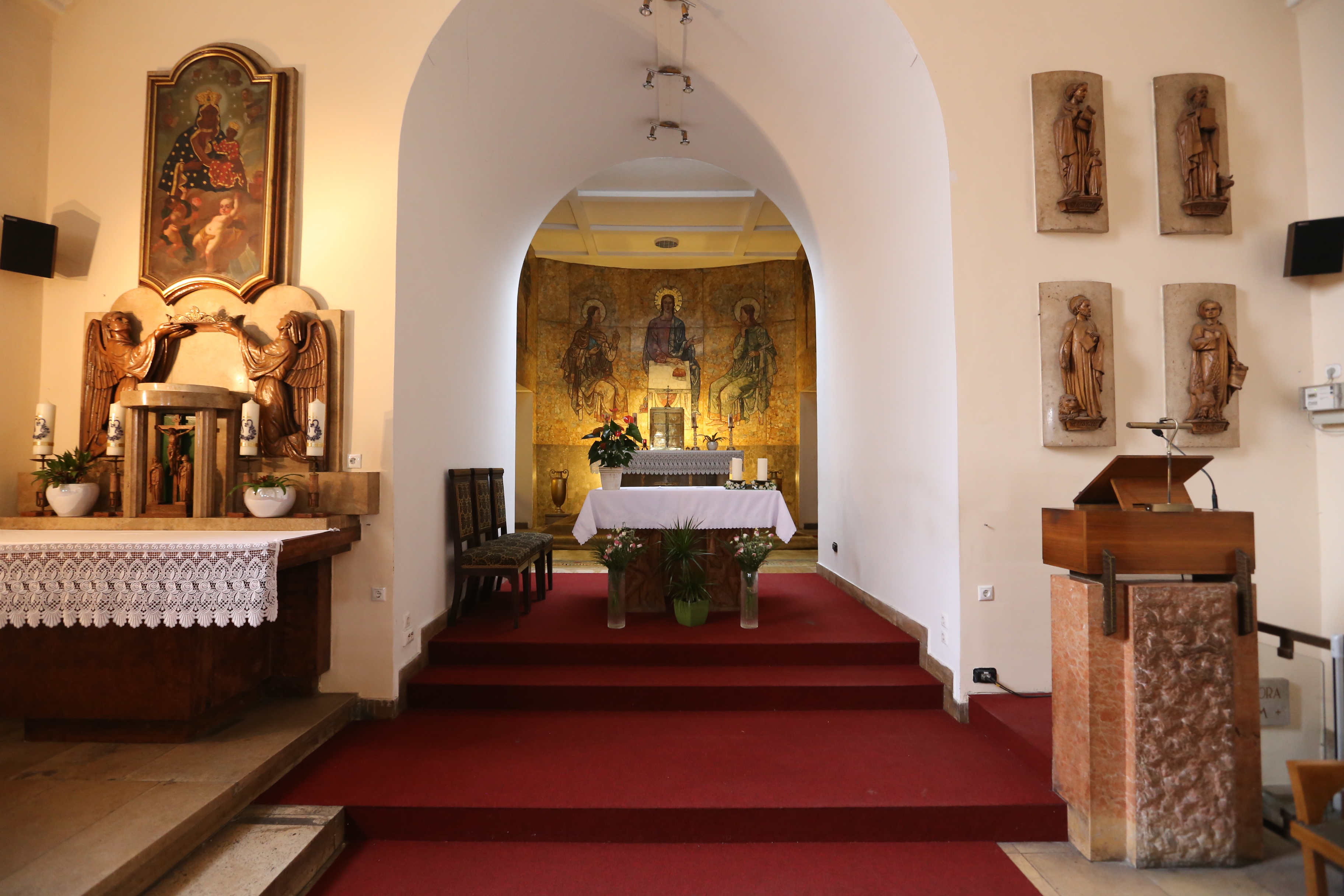 Szent Rókus-kápolna, Rókus-kápolna faliképe (Mattioni Eszter (mozaikkészítő) 1963) This is a photo of a monument in Hungary. Identifier: 957